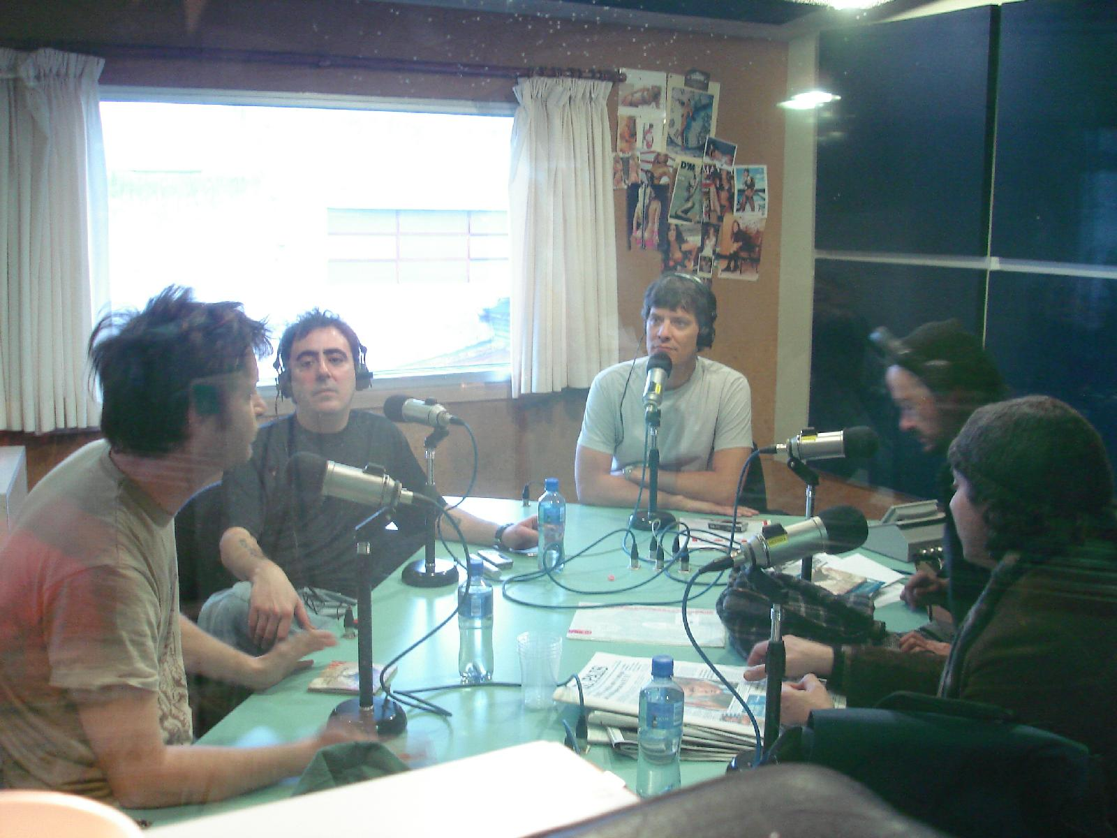 cual es